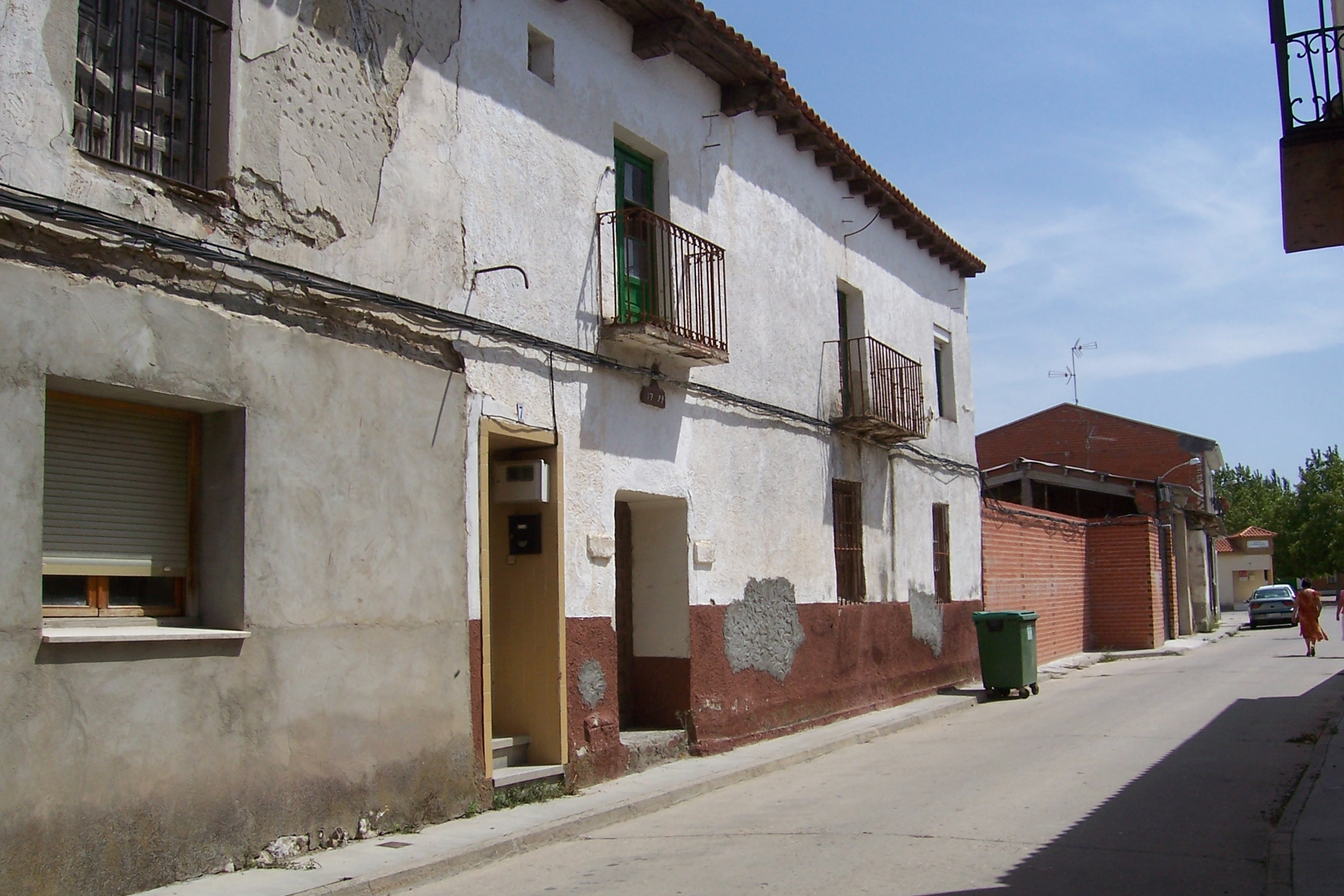 La Pedraja de Portillo de la provincia de Valladolid, España. Una calle con arquitectura popular. La casa encalada, con dos balcones tiene unas inscripción con la fecha de 1799.